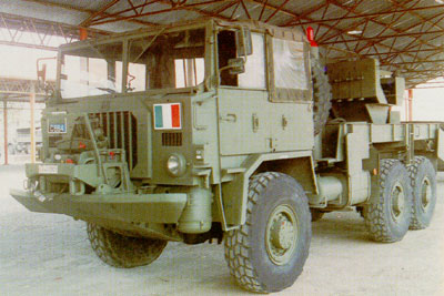 Augorgru media, esercito italiano